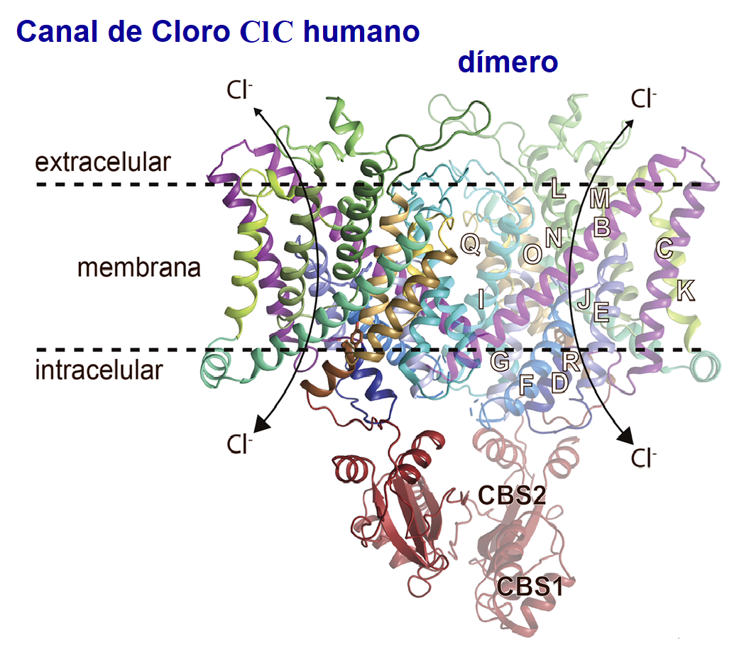 Estructura general del Canal de Cloro ClC-1 humano. Uno de los monómeros en colores pálidos (a la derecha), las hélices están etiquetadas con letras blancas. CBS: cistationina-β-sintasa (abajo en rojo. Cl: cloruro.